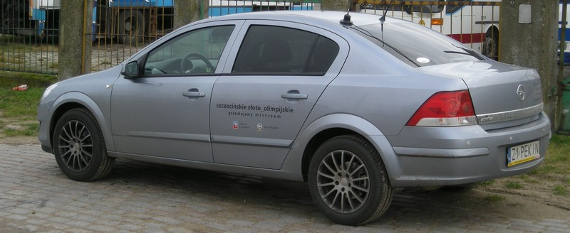 Opel Astra w wersji sedan należący do Marka Kolbowicza – nagroda od władz miasta Szczecina za zdobycie złotego medalu olimpijskiego w Pekinie w 2008 roku